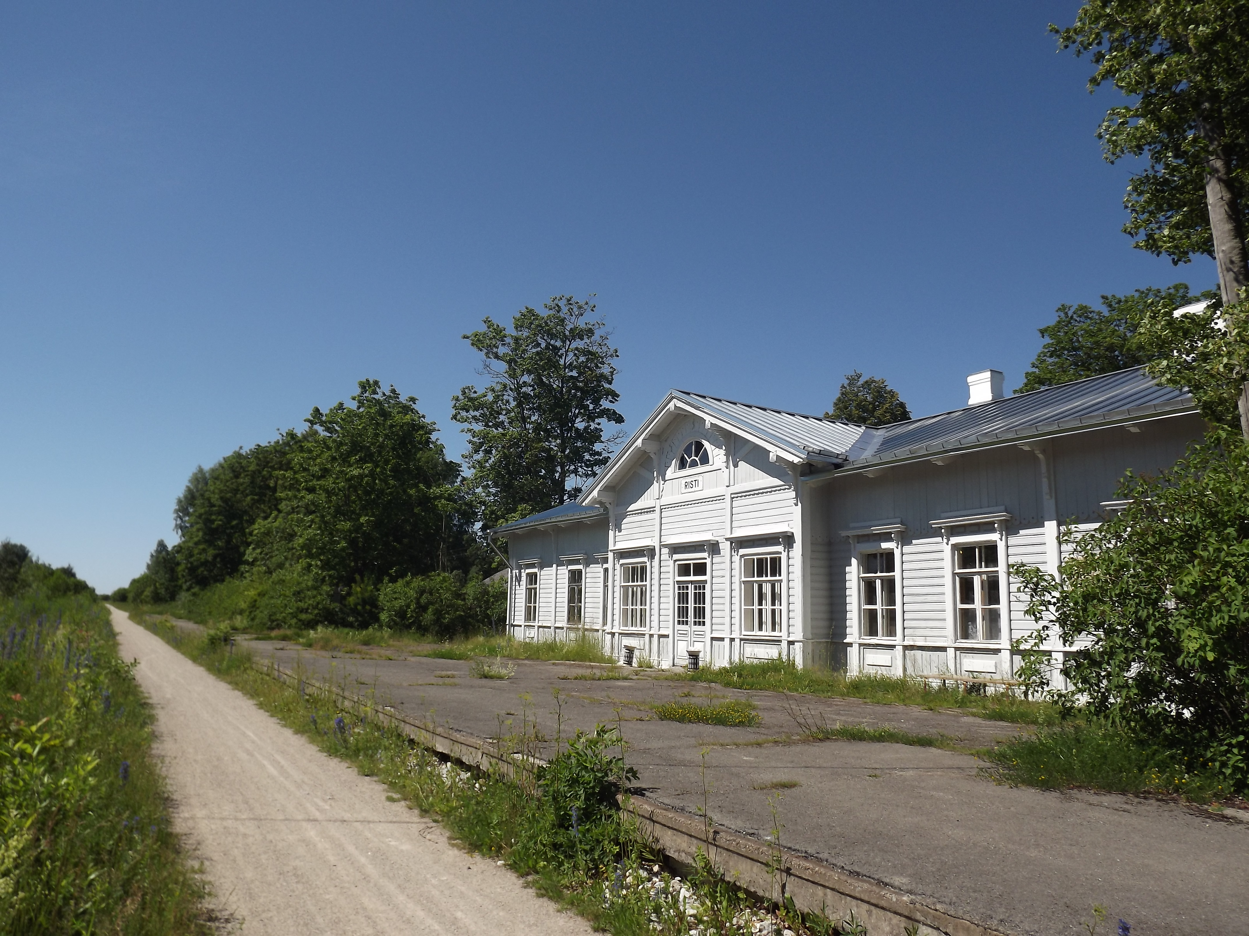 Renoveeritud Risti jaamahoone.